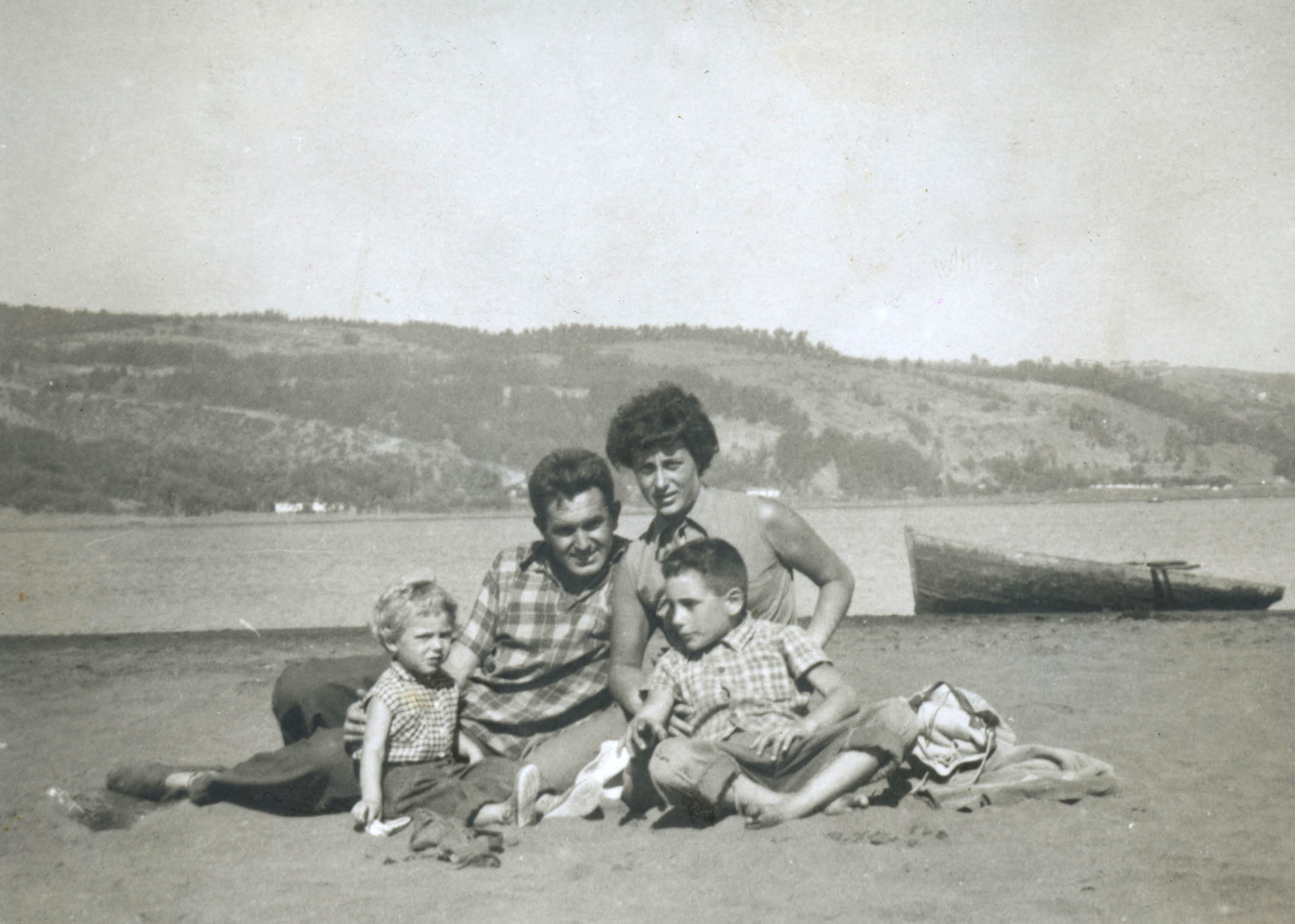 Familia de Michelle Bachelet durante su infancia, junto a su padre, madre y hermano mayor, de vacaciones en Cáhuil, en la comuna de Pichilemu, actual provincia Cardenal Caro. Descripción original: La familia Bachelet Jeria durante sus vacaciones en el balneario Cahuil.